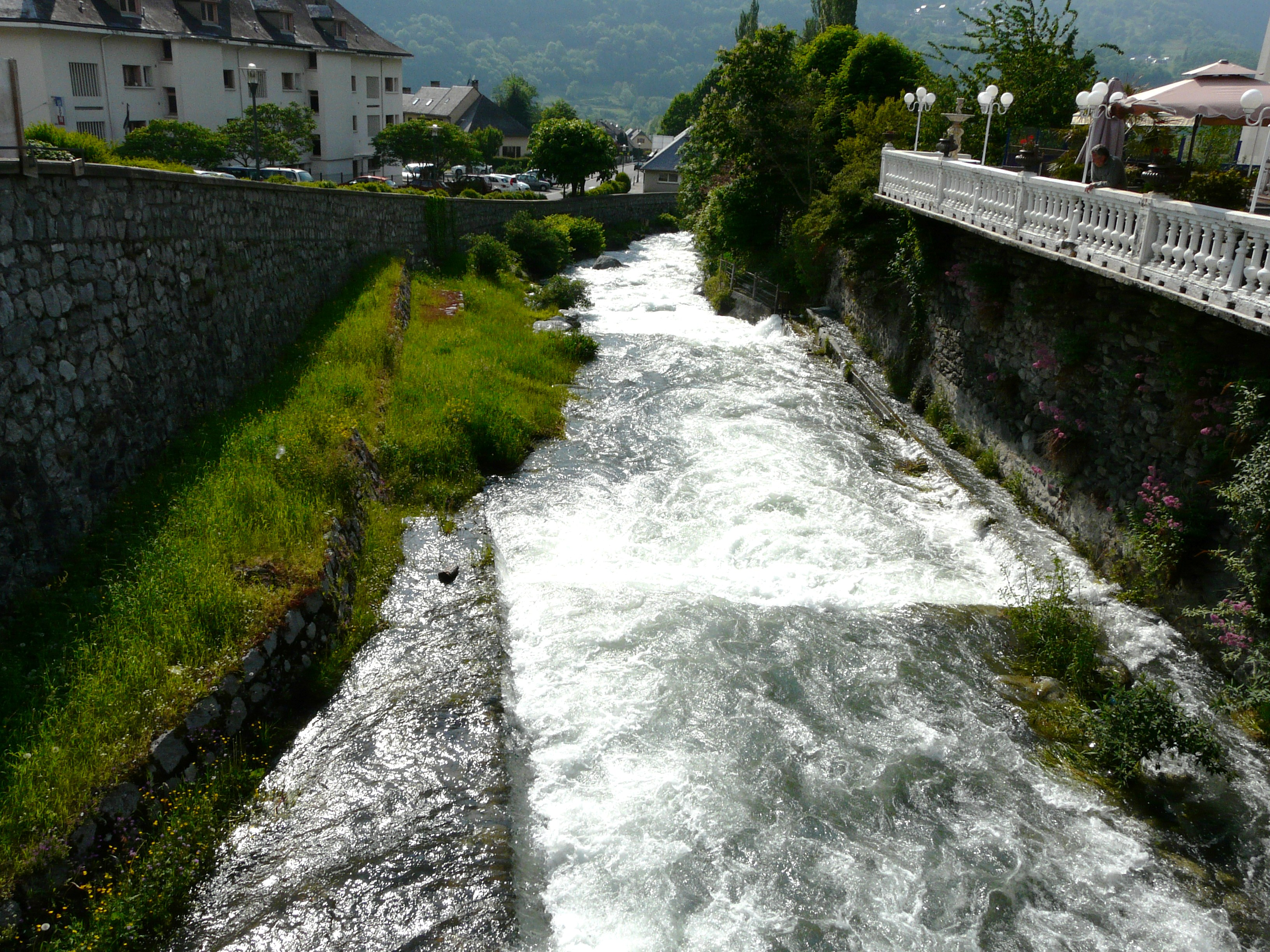 En aval du pont de la route départementale 921, le Bastan sert de limite entre les communes de Luz-Saint-Sauveur (à gauche) et d'Esquièze-Sère (à droite), Hautes-Pyrénées, France.